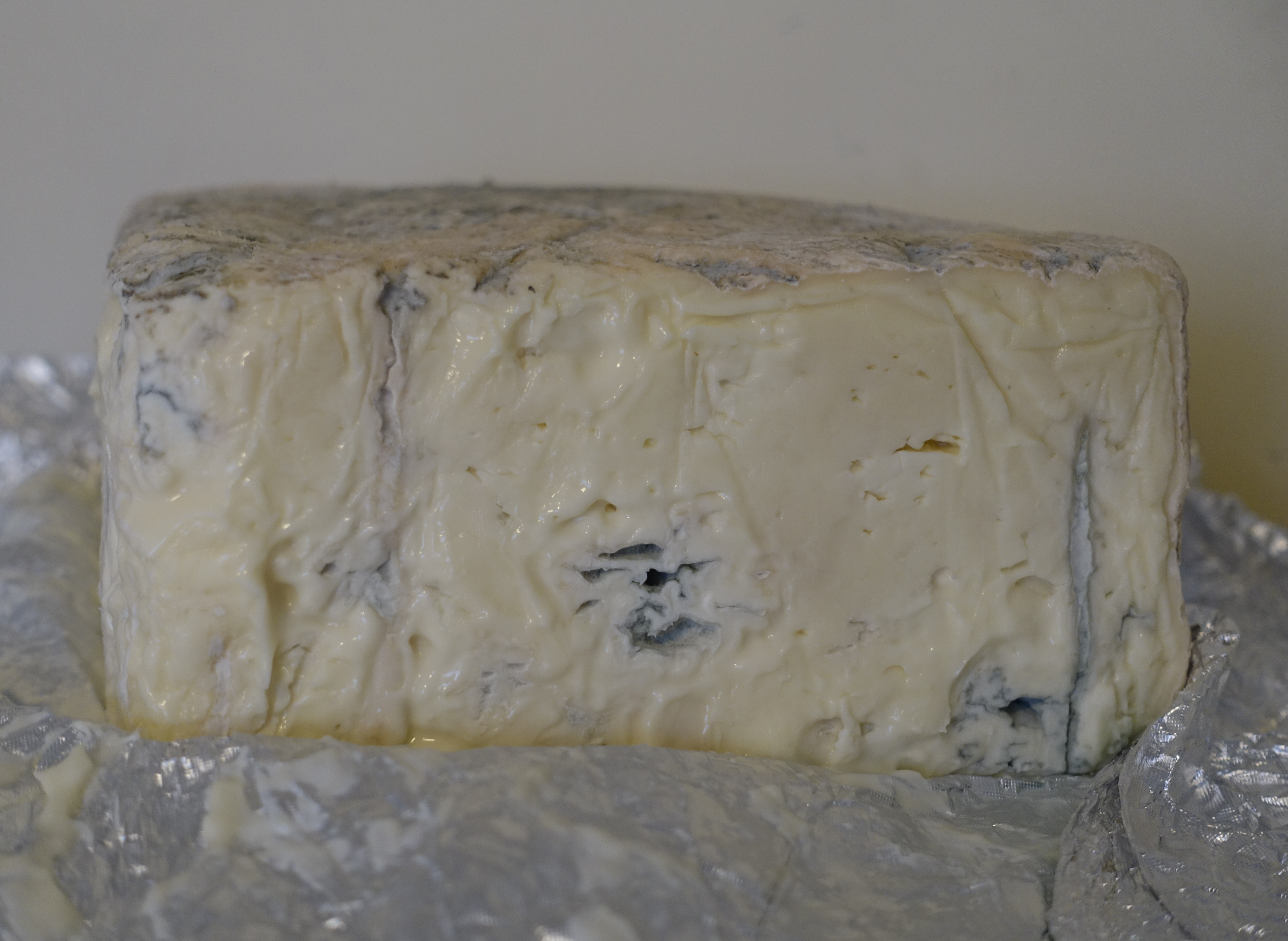 Gorgonzola DOP